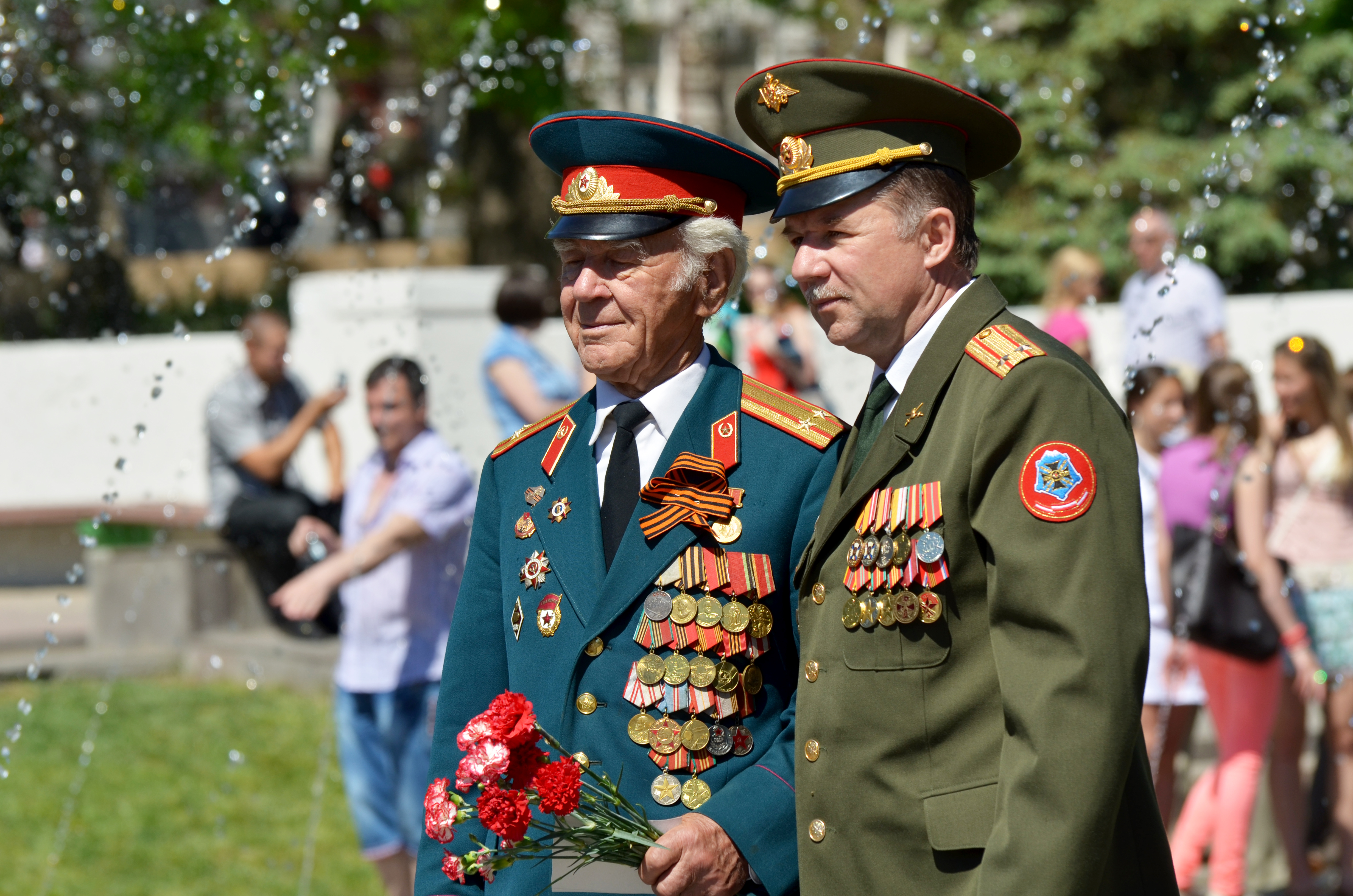 Спасибо деду за попеду! 9 Мая 2013 год (Ростов-на-Дону)